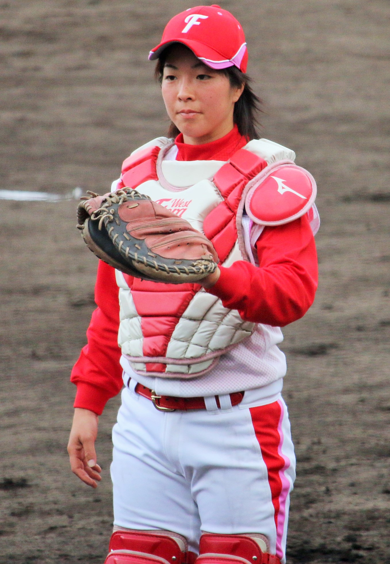 ウエスト・フローラ捕手の佐伯千夏。わかさスタジアム京都にて。